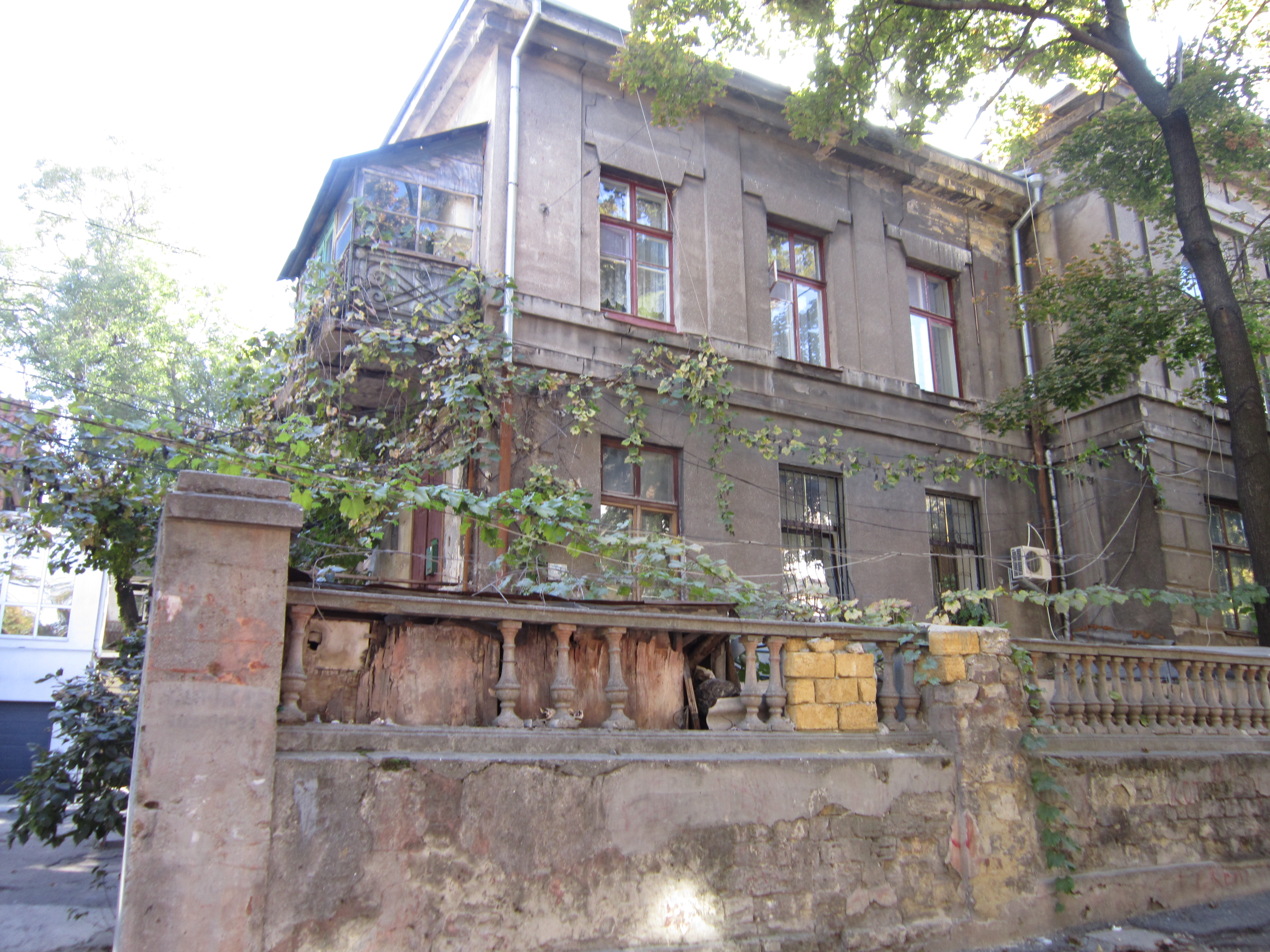 Будинок, в якому жили: Б.В. Едуардс - скульптор, академік Петербурзької АХ, один із засновників ТЮРХ ;М.І. Батуєв - вчений-анатом, професор, Одеса, Ляпунова пров., 3